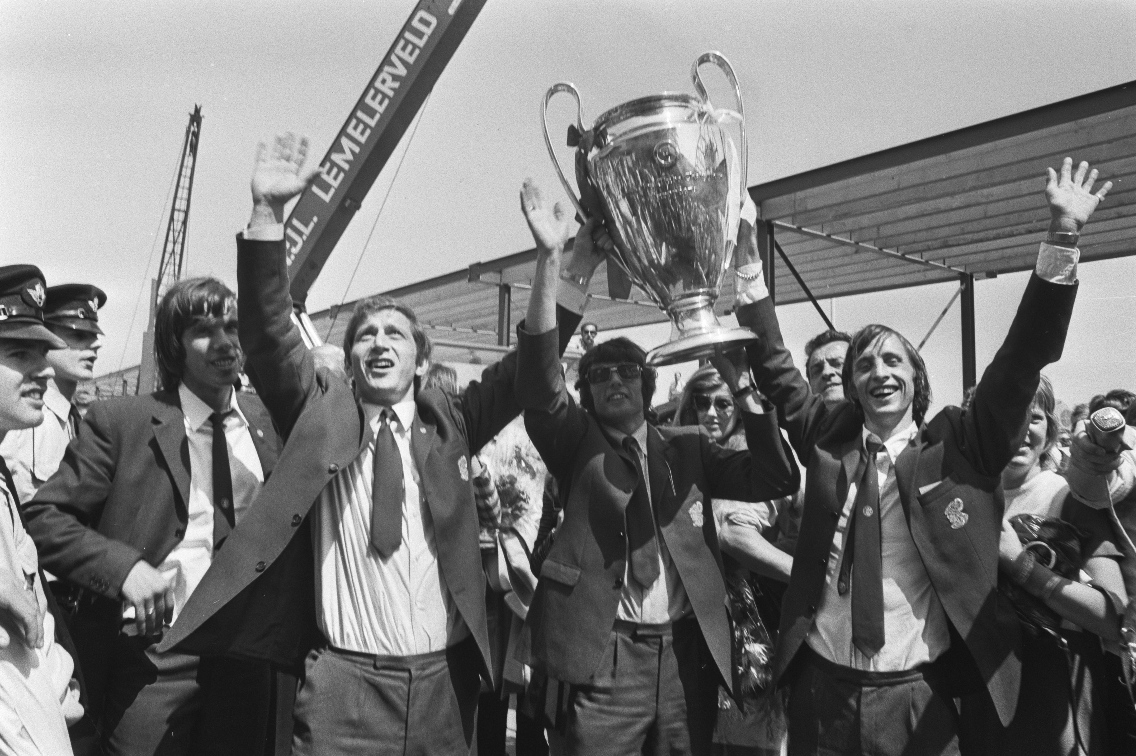 Collectie / Archief : Fotocollectie Anefo Reportage / Serie : Elftal Ajax arriveert met Europa Cup op Schiphol uit Londen Beschrijving : V.l.n.r. Van Dijk, Vasovic, Suurbier en Cruijff met de beker Datum : 3 juni 1971 Locatie : Noord-Holland, Schiphol Trefwoorden : aankomst en vertrek, sport, vliegvelden, voetbal, voetballers Persoonsnaam : Cruijff, Johan, Dijk, Dick van, Suurbier, Wim, Vasovic, Velibor Instellingsnaam : Europa Cup Fotograaf : Fotograaf Onbekend / Anefo, [onbekend] Auteursrechthebbende : Nationaal Archief Materiaalsoort : Negatief (zwart/wit) Nummer archiefinventaris : bekijk toegang 2.24.01.05 Bestanddeelnummer : 924-6130